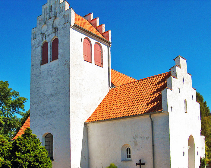 fra sydvest